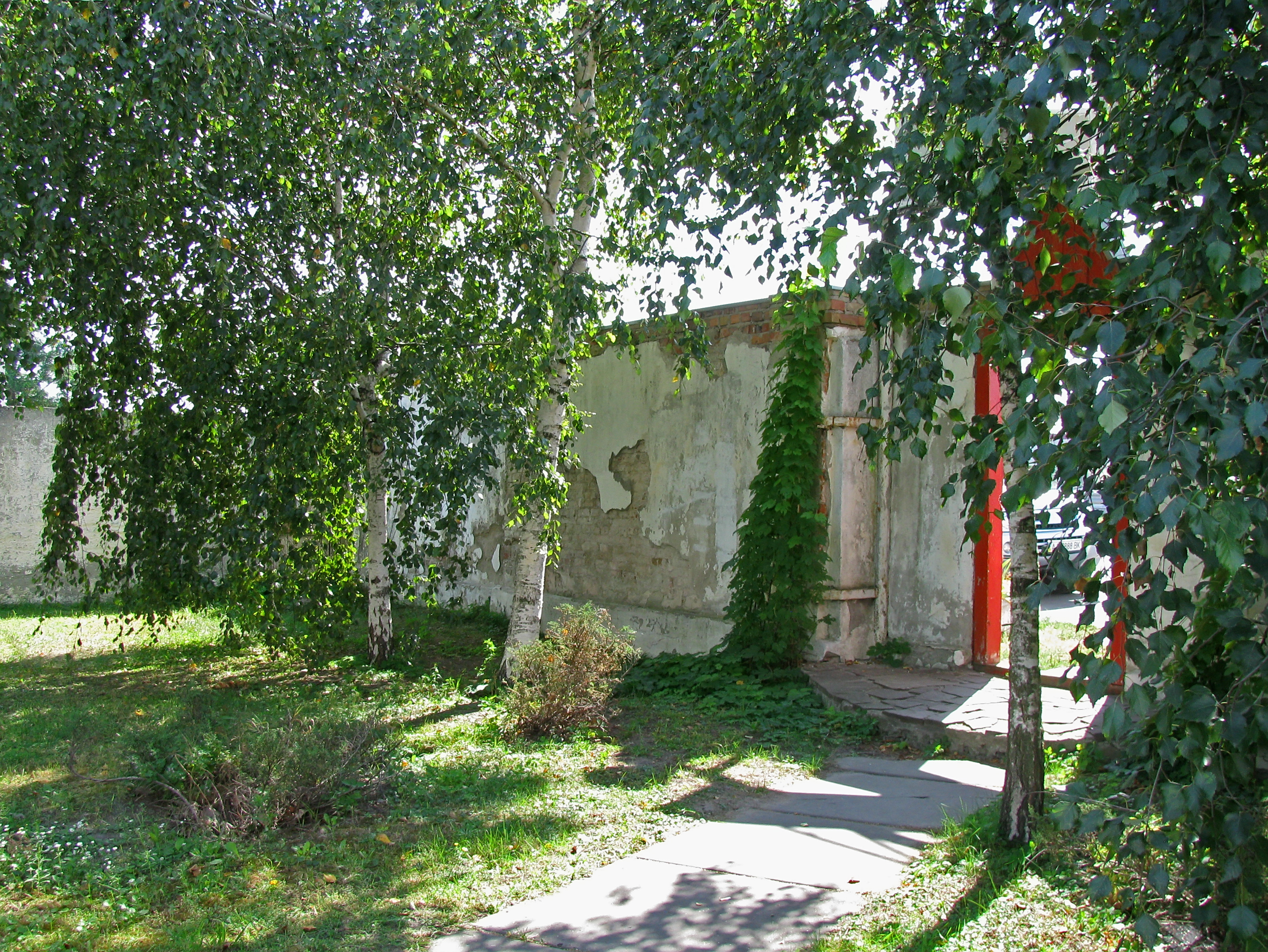 Поштова станція на 32 кілометрі. Огорожа з воротами (вихід на трасу в східній частині двору). Не збереглась, перебудована.